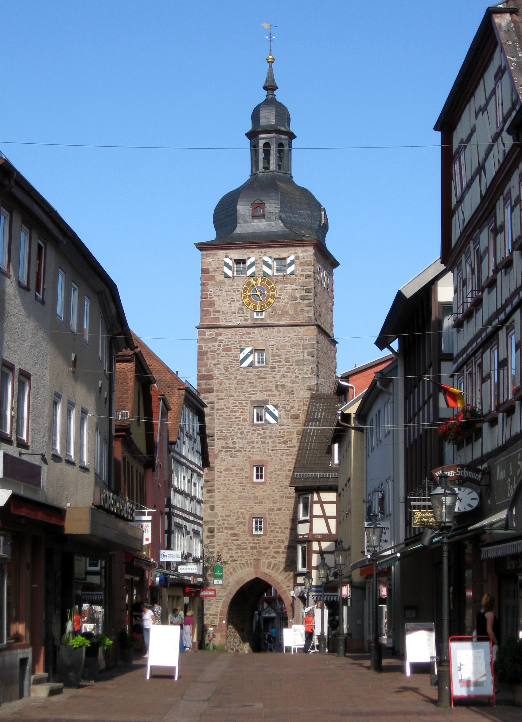 Marktstraße und Stadtturm in Buchen (Odenwald), Baden-Württemberg.